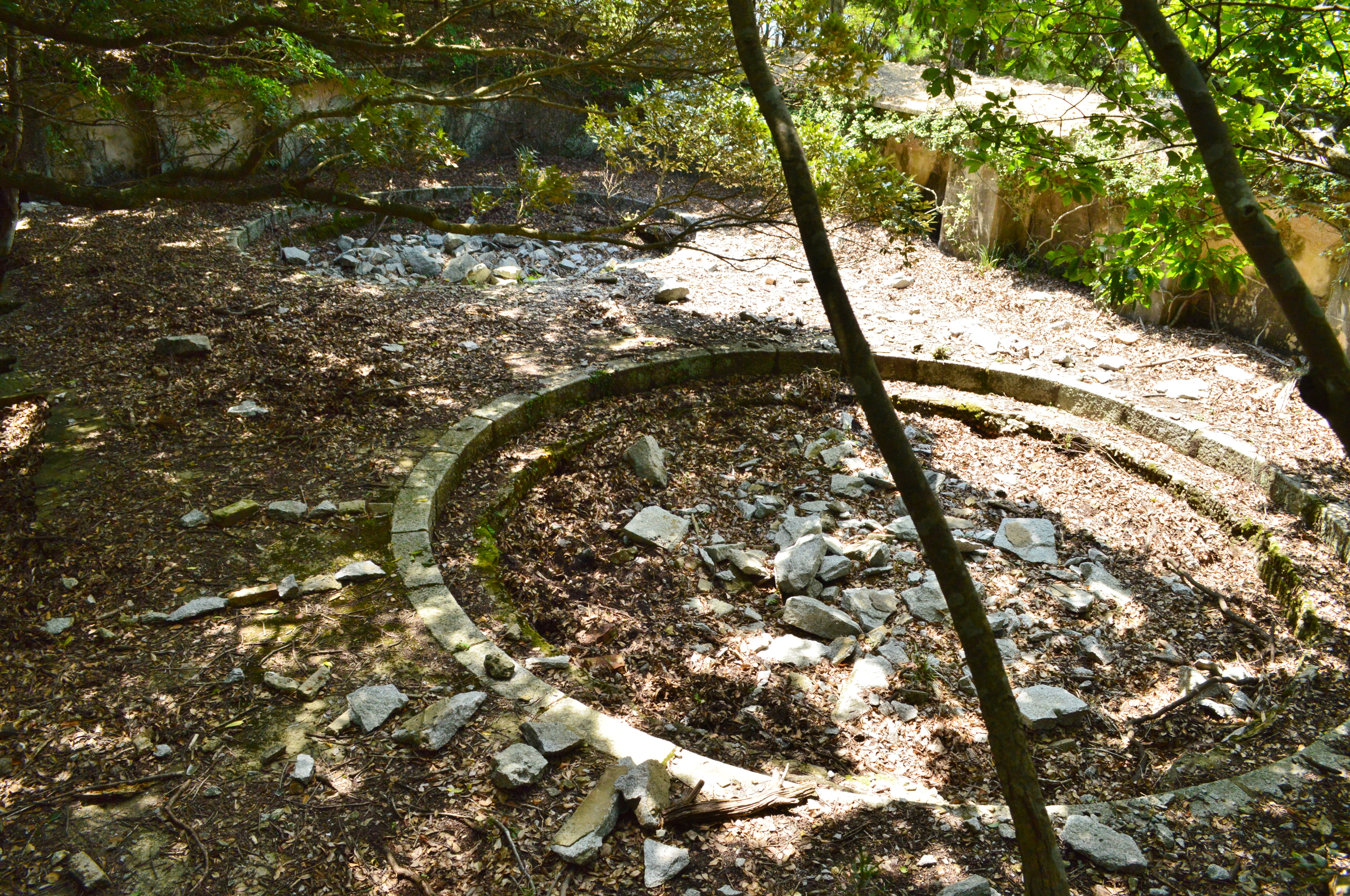 対馬要塞 城山砲台の遺構